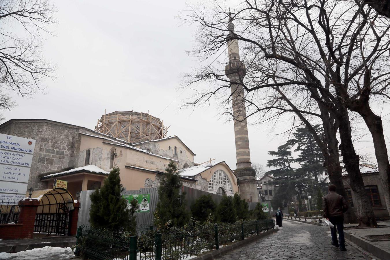 'un 11 Ocak 2016'da çektiği fotoğraftır. izin alınarak yüklenmiştir.